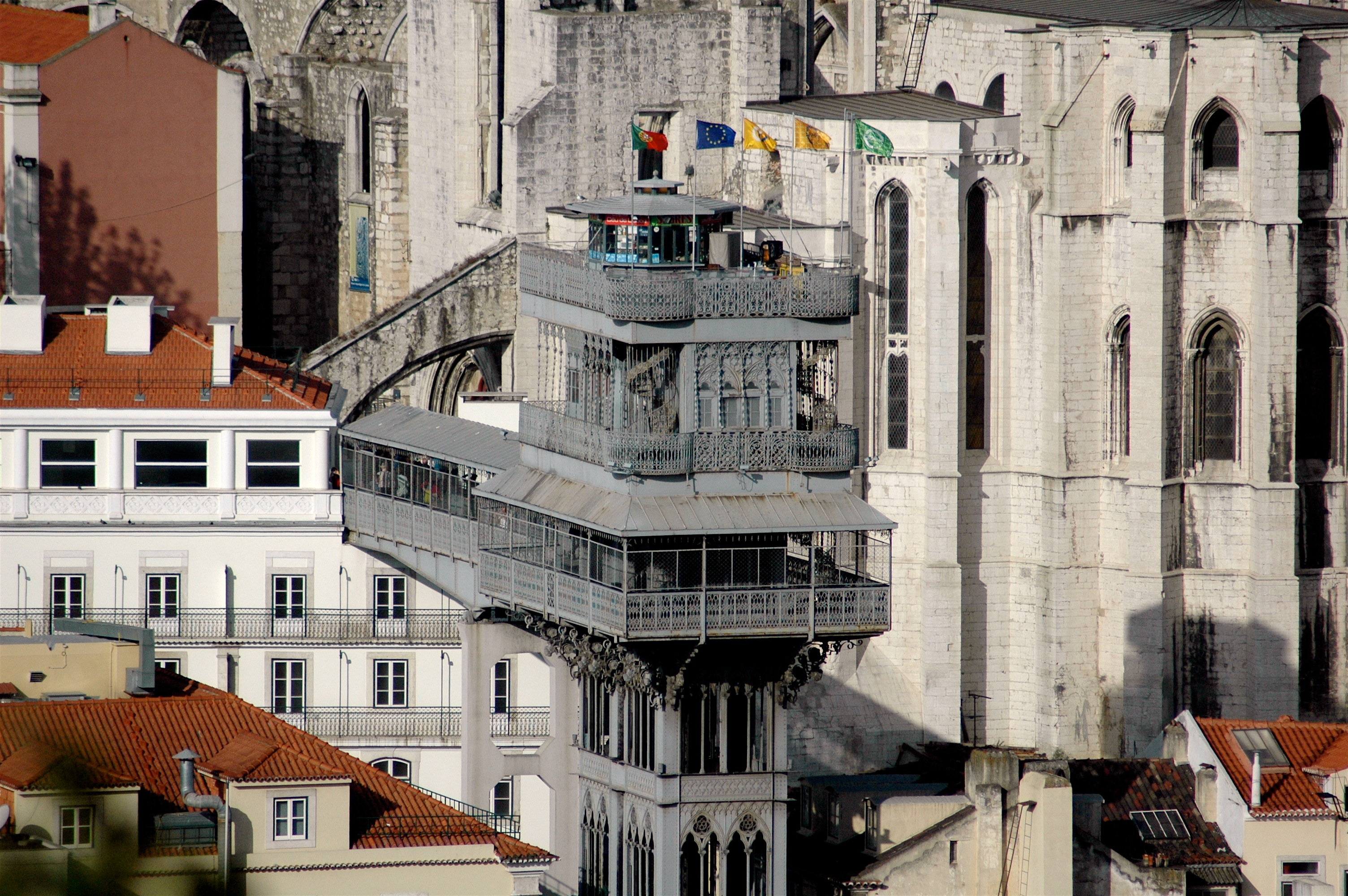 De Santa Justa lift in Lissabon (Portugal)